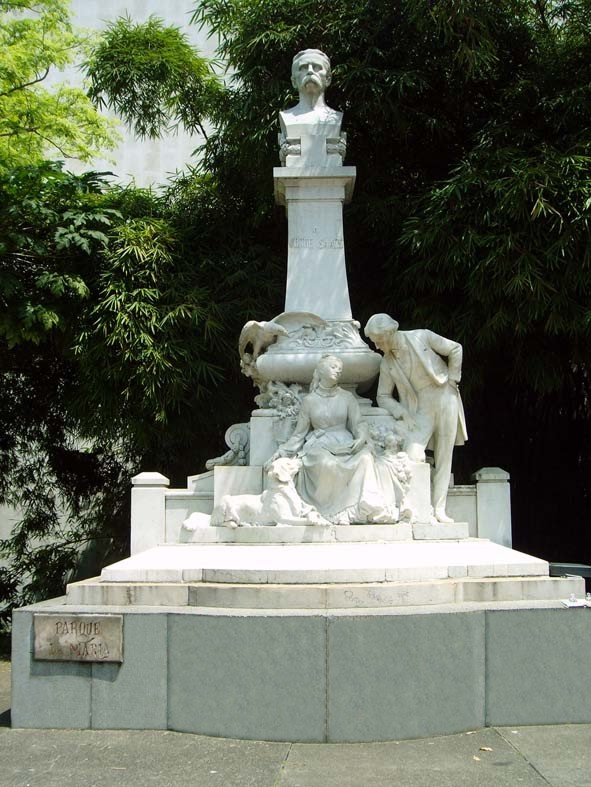 Monumento a María de Jorge Isaac, Cali, Colombia